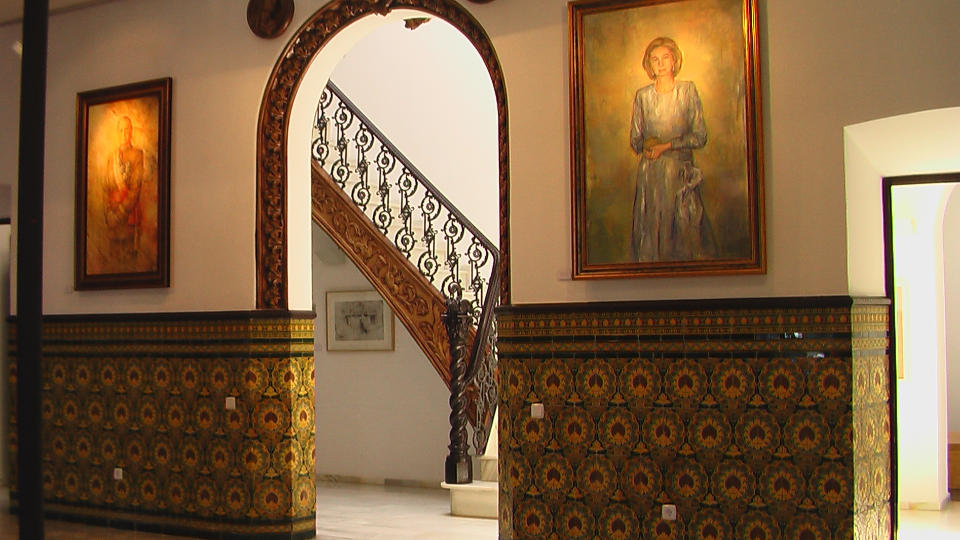 Azuaga Museo Etnográfico de Azuaga